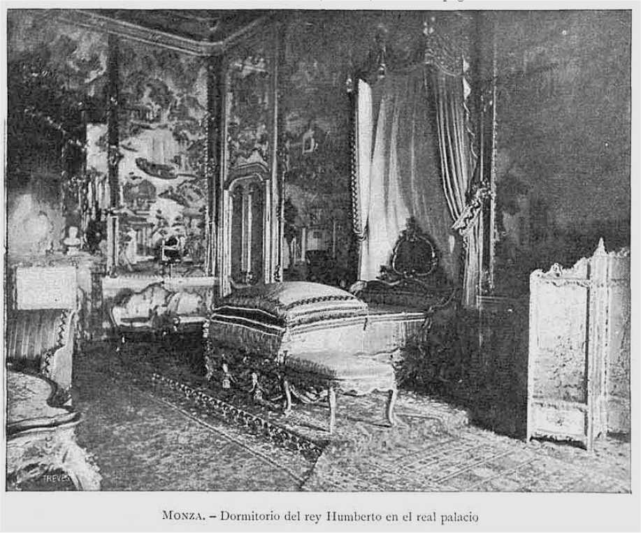 Monza - Villa Reale la camera da letto di Umberto I